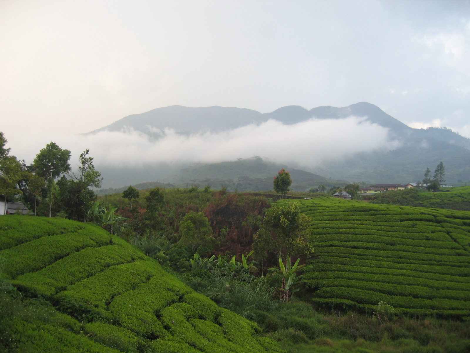 Mount Talang